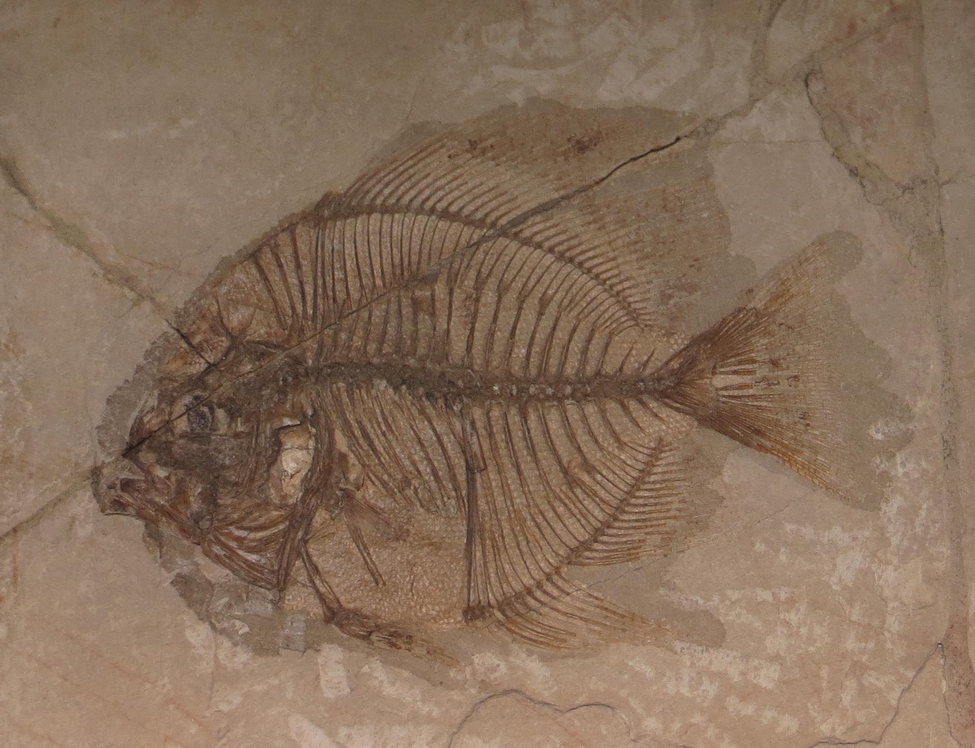 Fossil Psettopsis subarcuatus